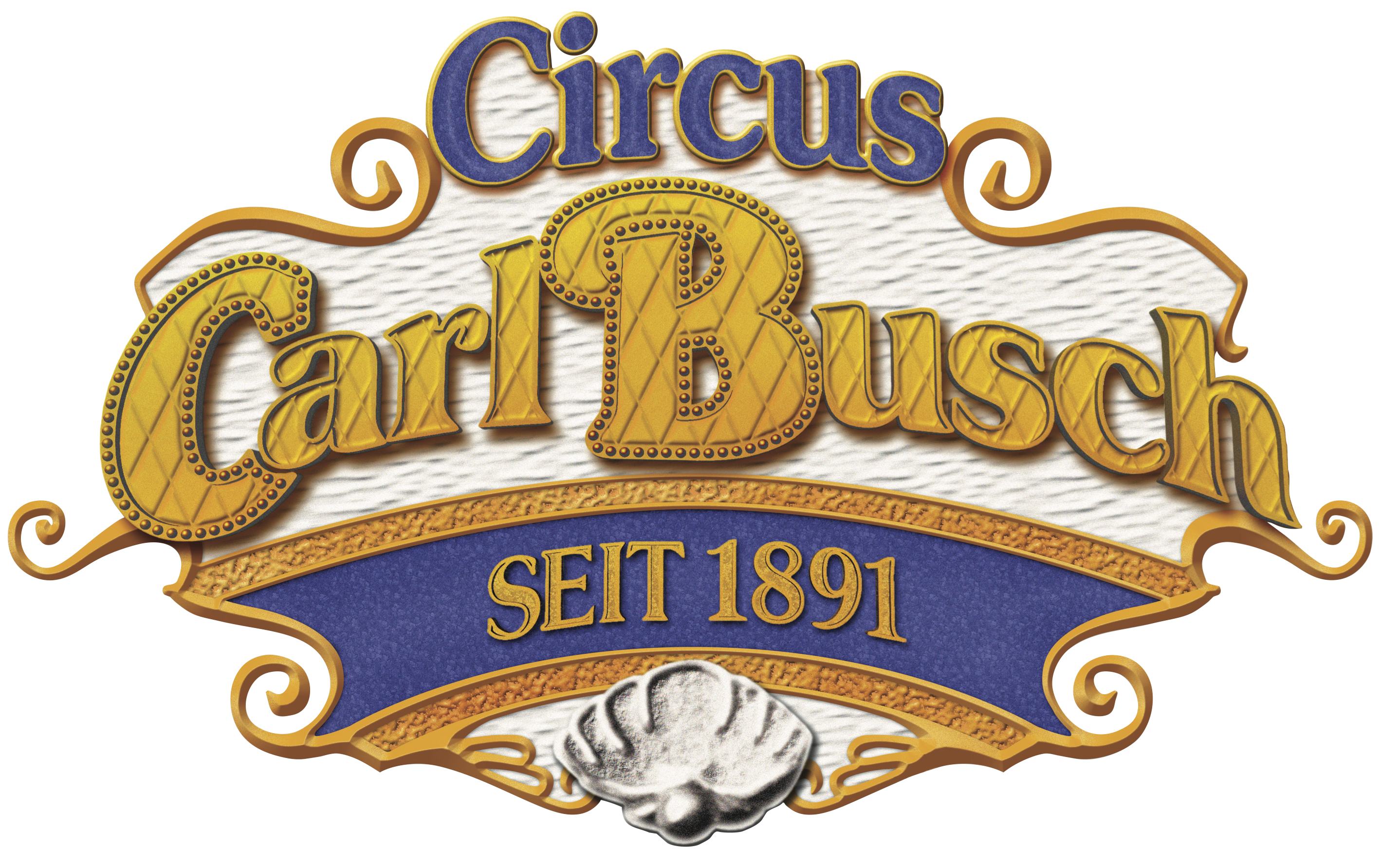 Logo Circus Carl Busch (seit 2002) von Ludger Elfgen